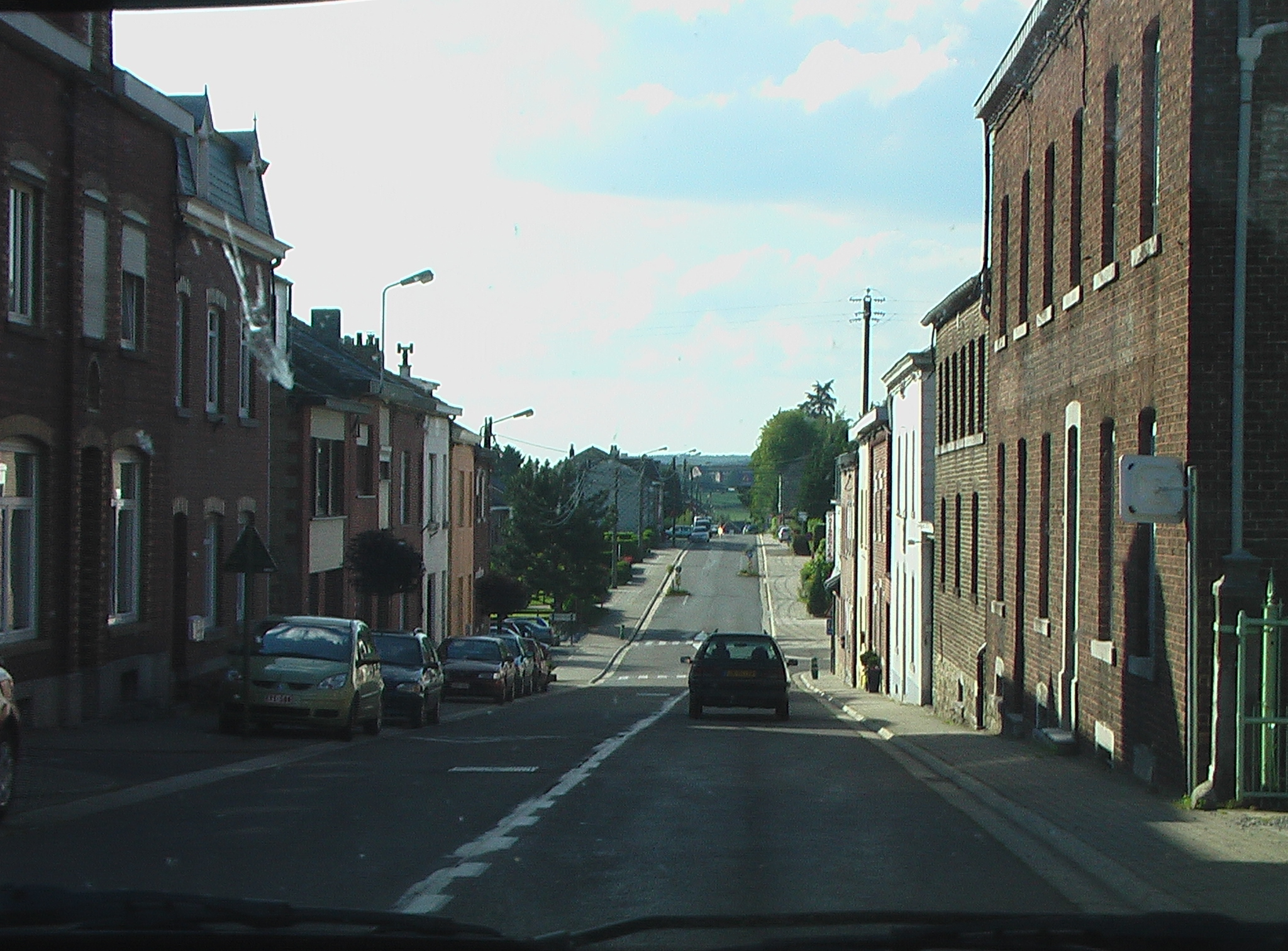 Gemmenich in Blieberg, Plombières, a village in Belgium.